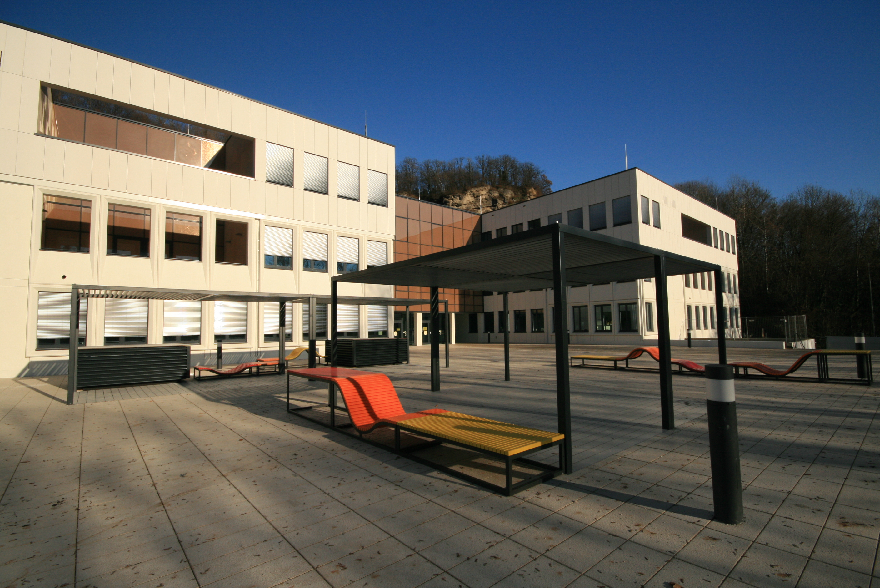 Außenansicht Neubau Akademisches Gymnasium Salzburg im Herbst 2016